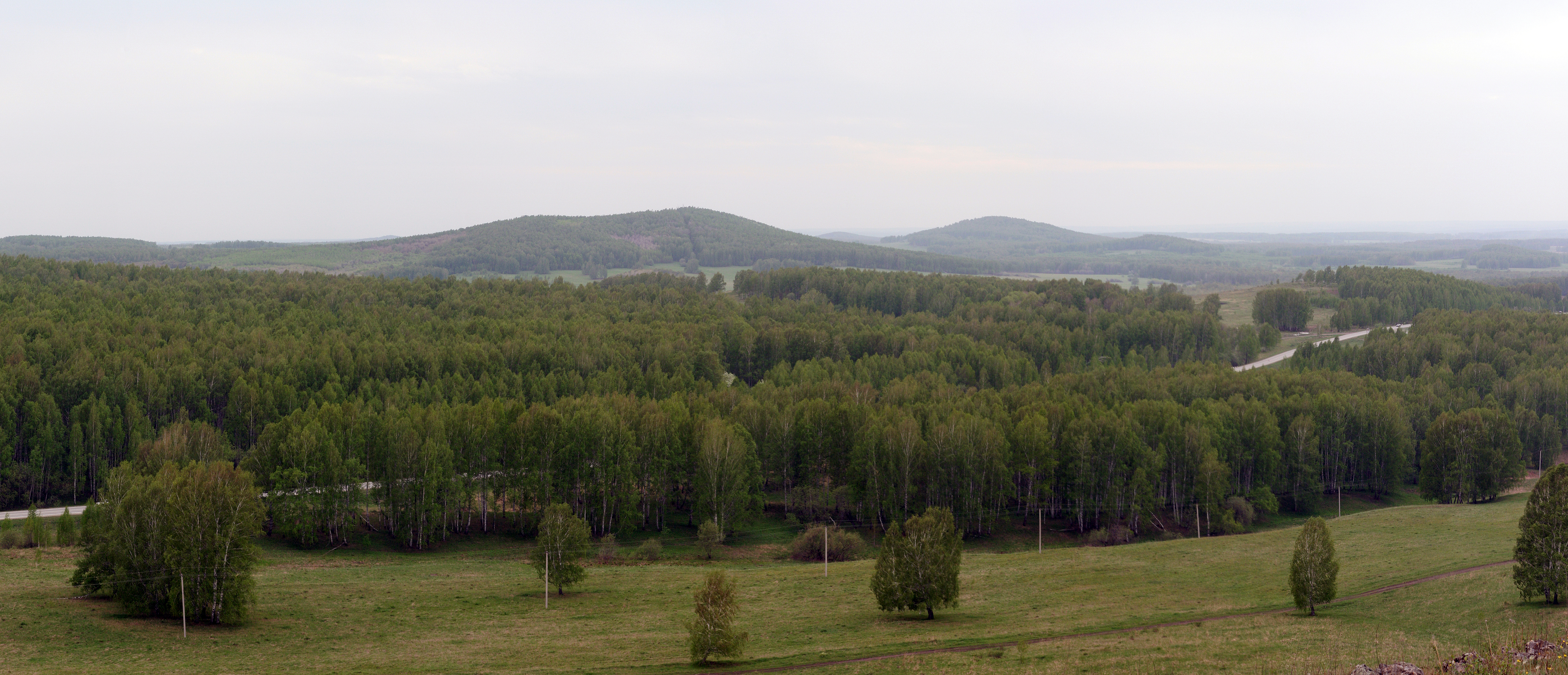 Буготакские сопки, Тогучинский район This image is related to the protected area of Russia number 5410109